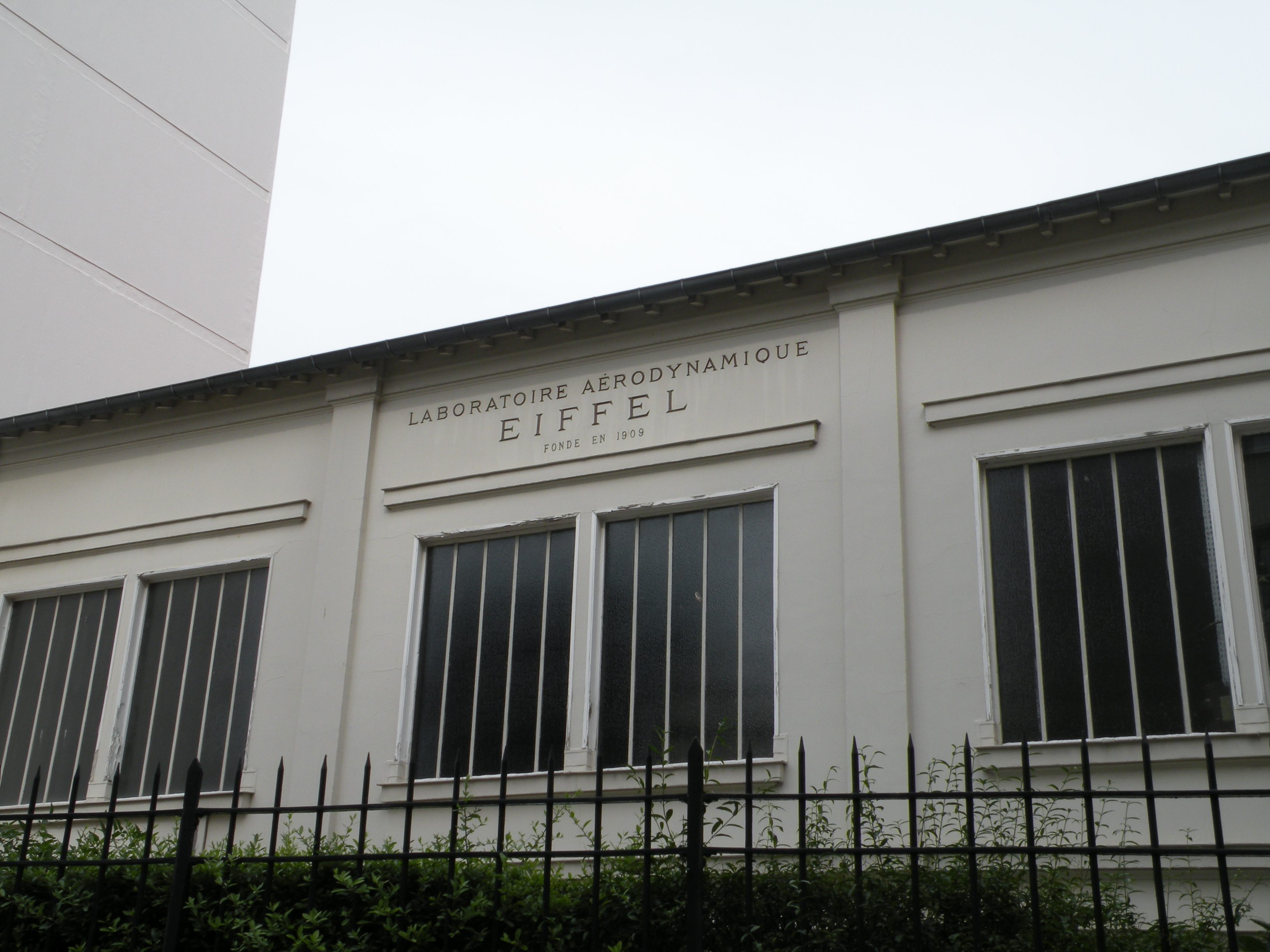 Laboratoire aérodynamique de Gustave Eiffel à Paris, rue Boileau.